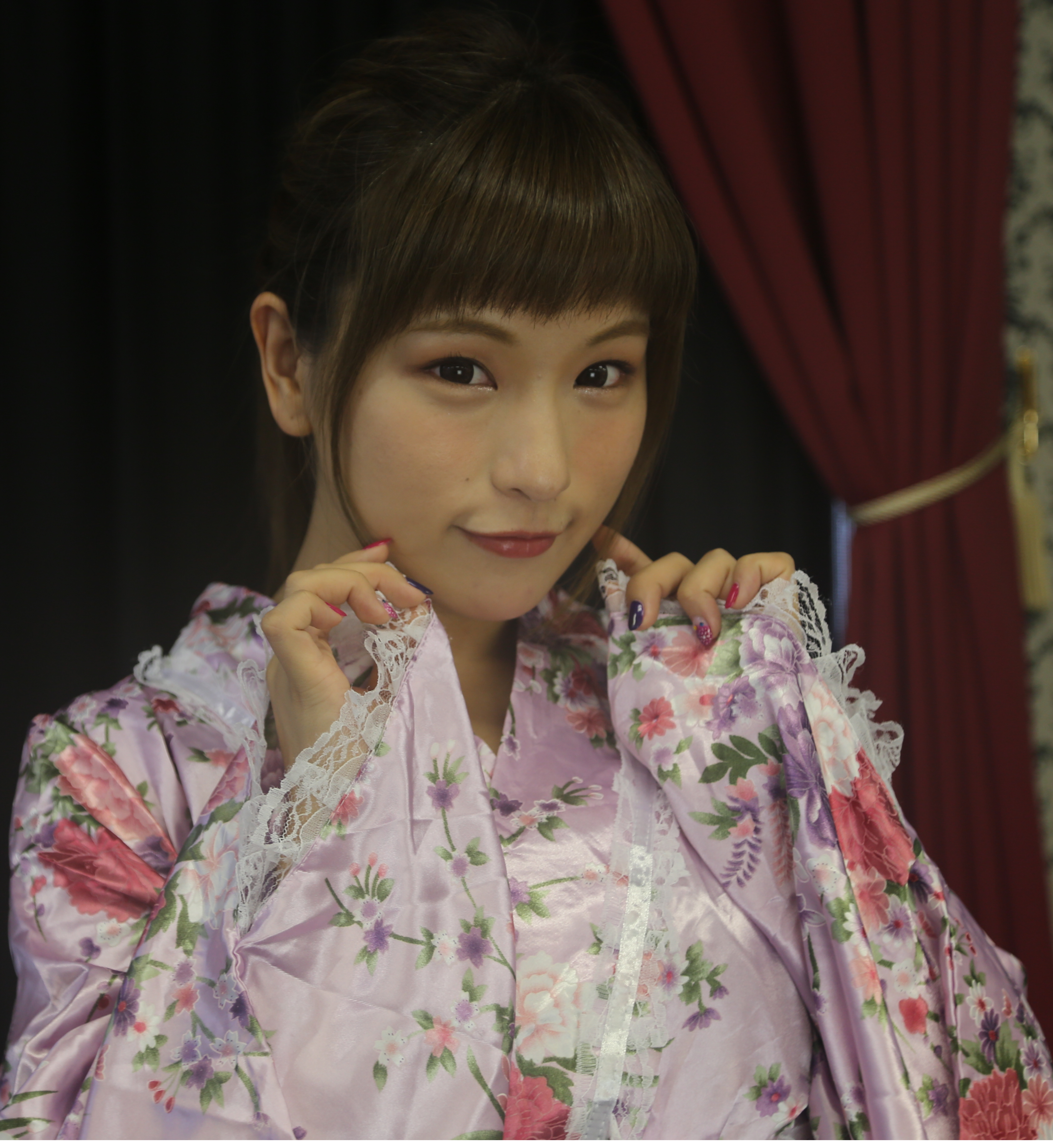 七海マキ 東京 撮影会